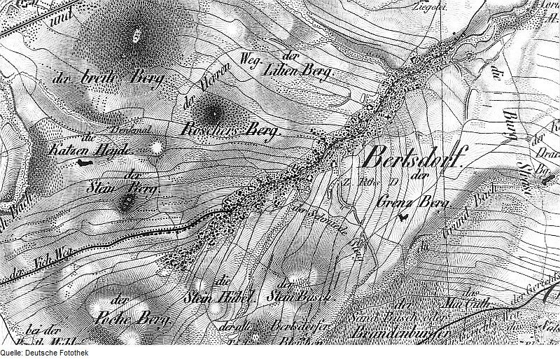 Original image description from the Deutsche Fotothek Bertsdorf-Hörnitz-Bertsdorf. Oberreit, Sect. Zittau, 1844/46